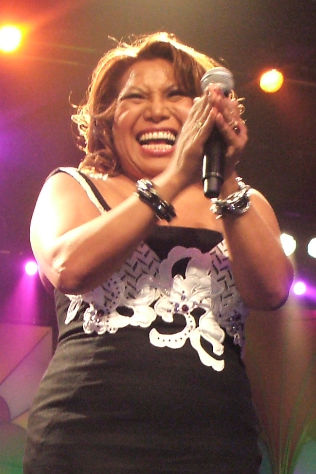 Template:Ni Justine Pelmelay